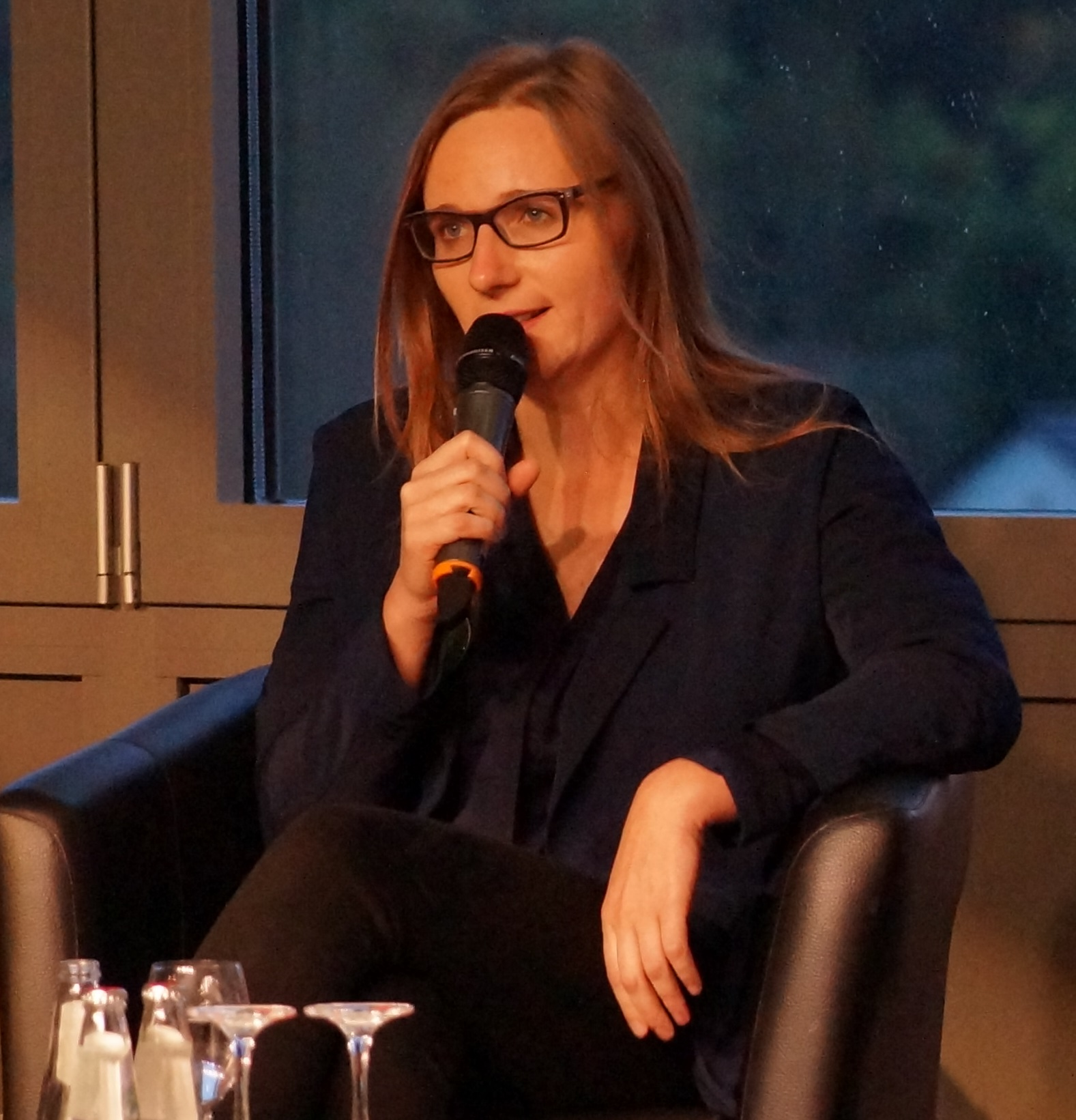 Lisa Badum, MdB